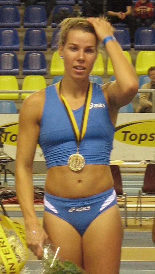 Hanna Marien